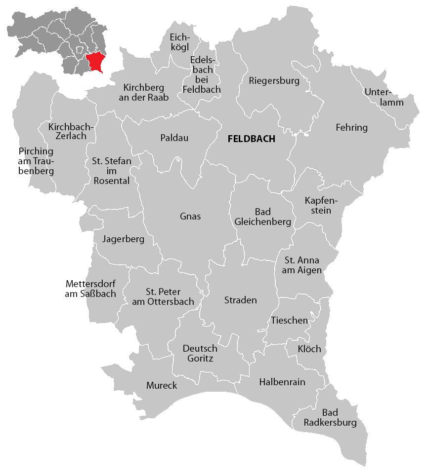 Gemeinden im Bezirk Südoststeiermark (Steiermark), Stand: 1. Januar 2020